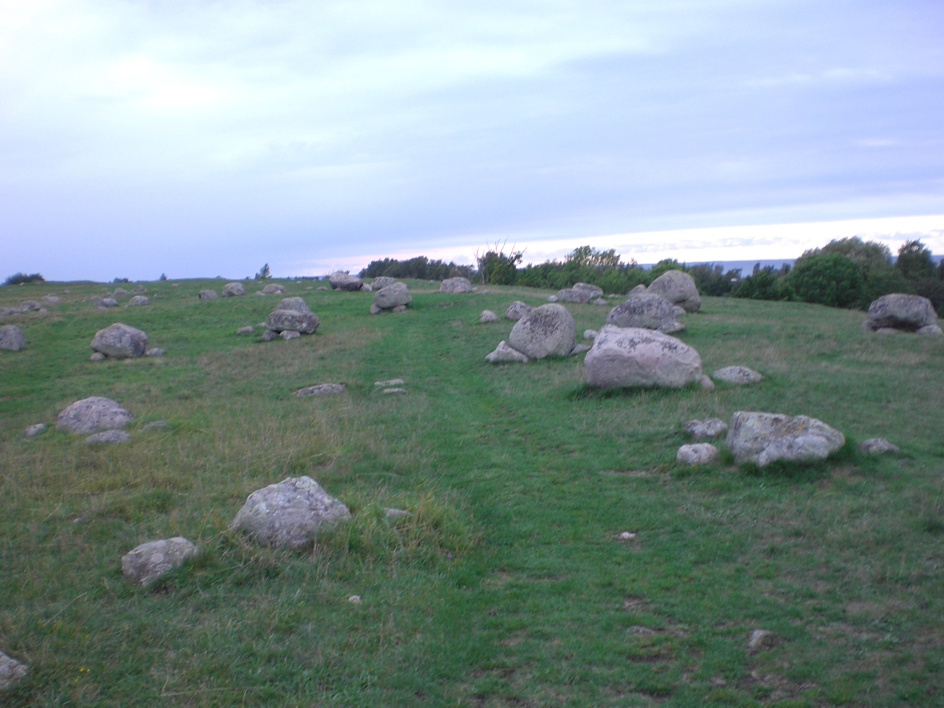 Gräberfeld auf Köpings Kliff, Öland, Schweden